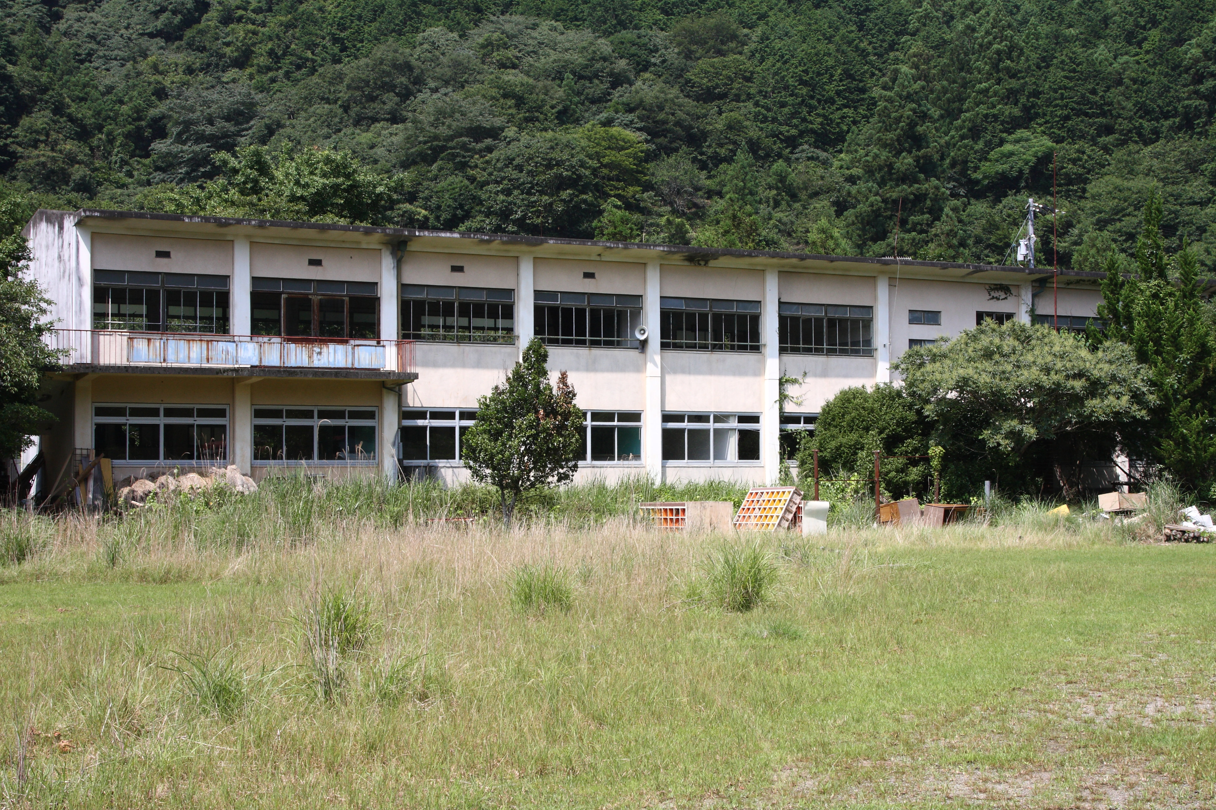 須賀利中学校跡 三重県尾鷲市須賀利町